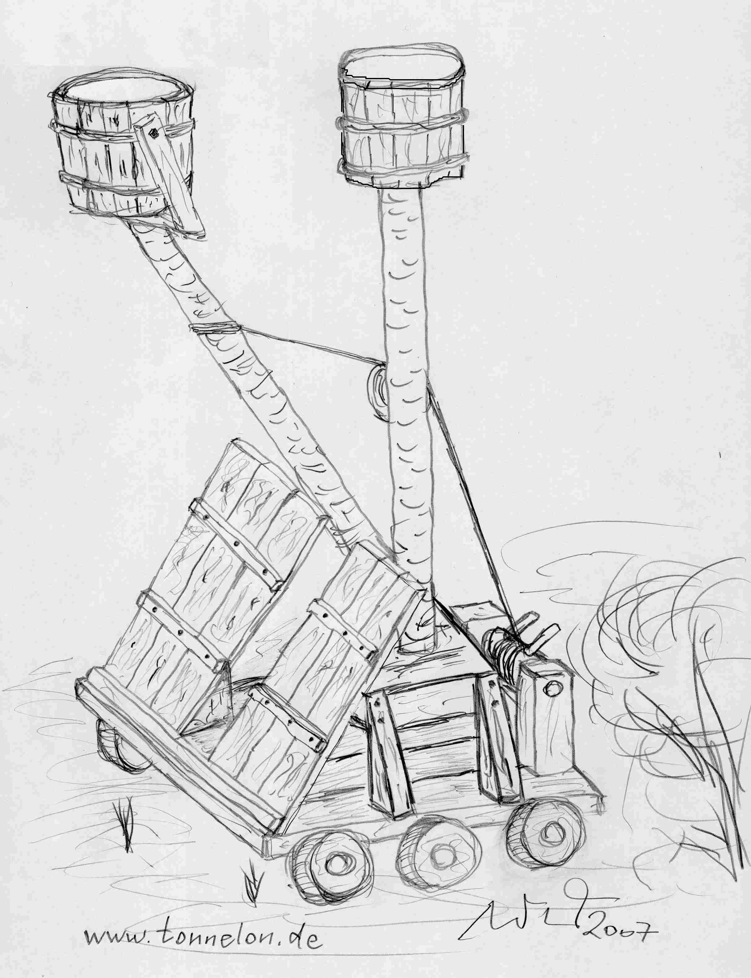 siege engine of Middle Age